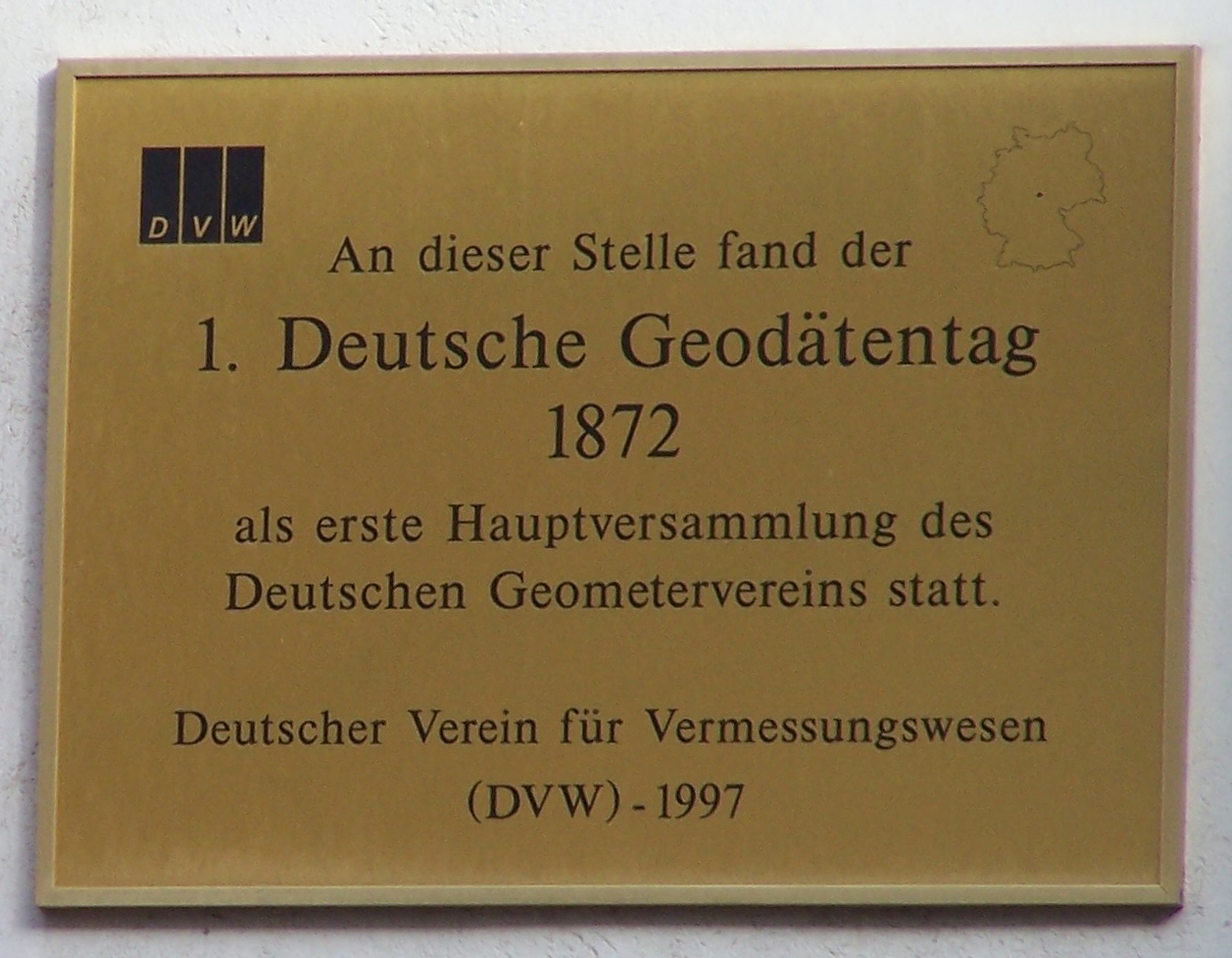 Gedenktafel zum Ersten Deutschen Geodätentag 1872 in Eisenach.